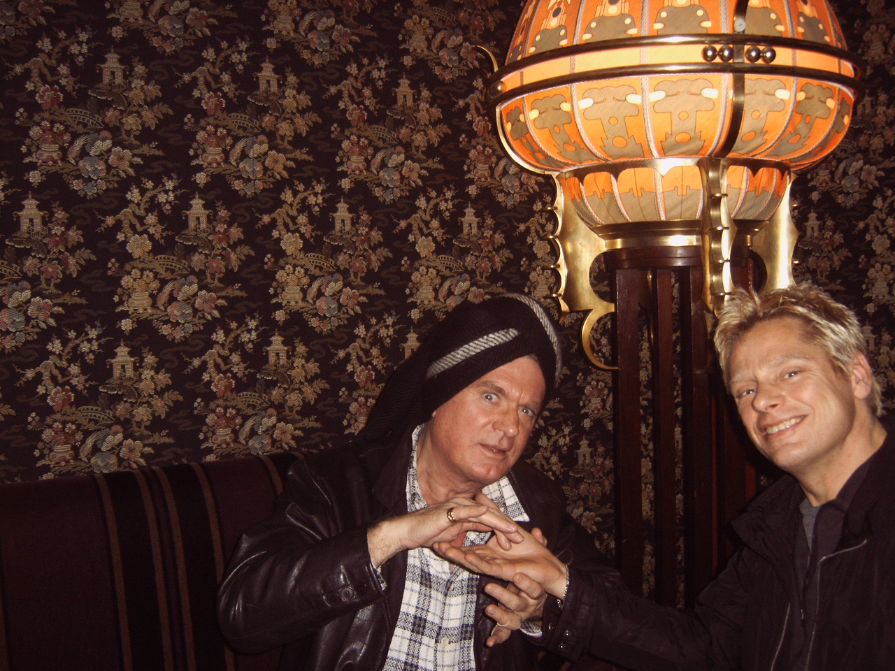 Carol van Herwijnen privé na een film in theater Tuschinski met Pim van der Horst in 2007